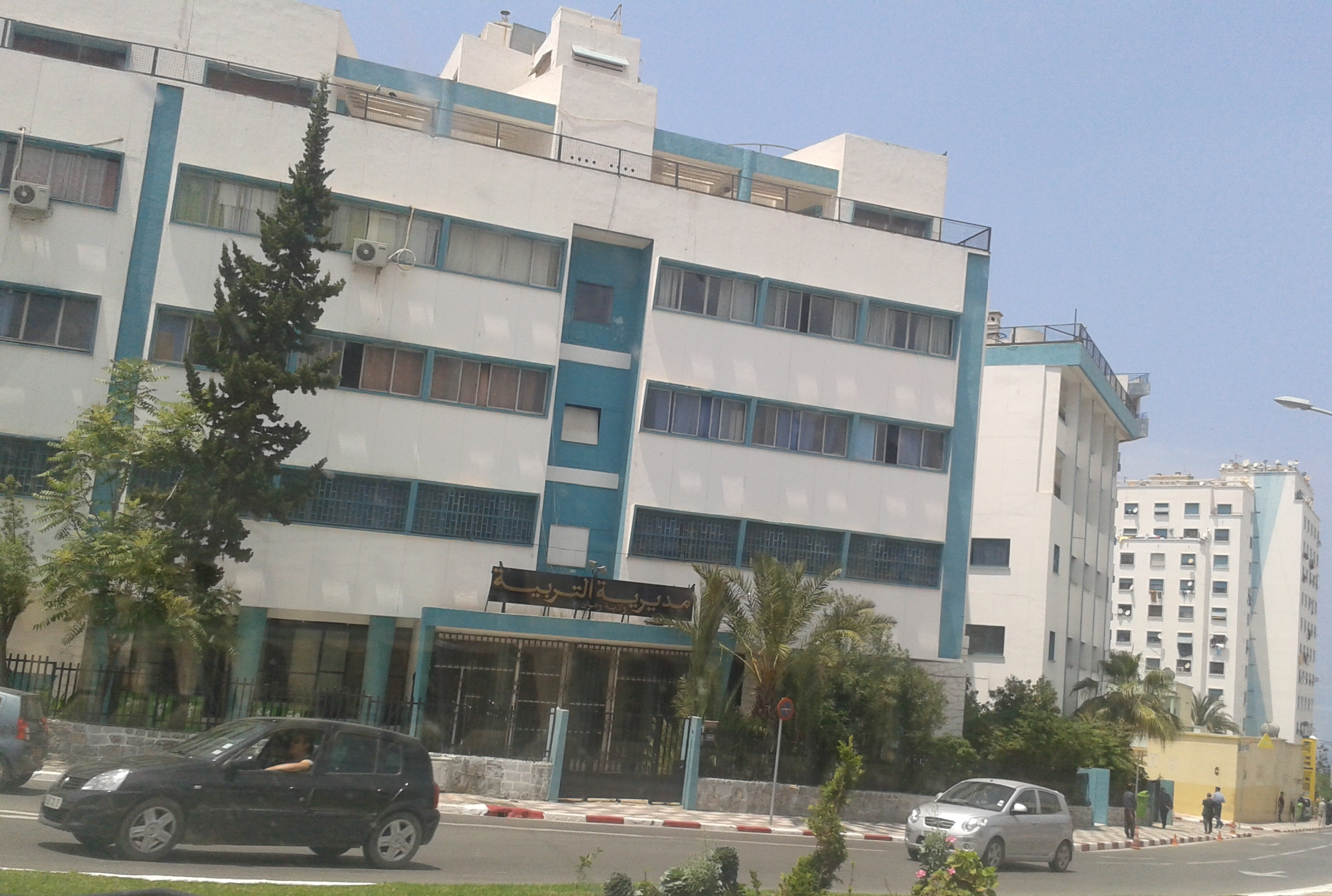 مديرية التربية لولاية وهران